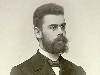 Б.Л.Модзалевский